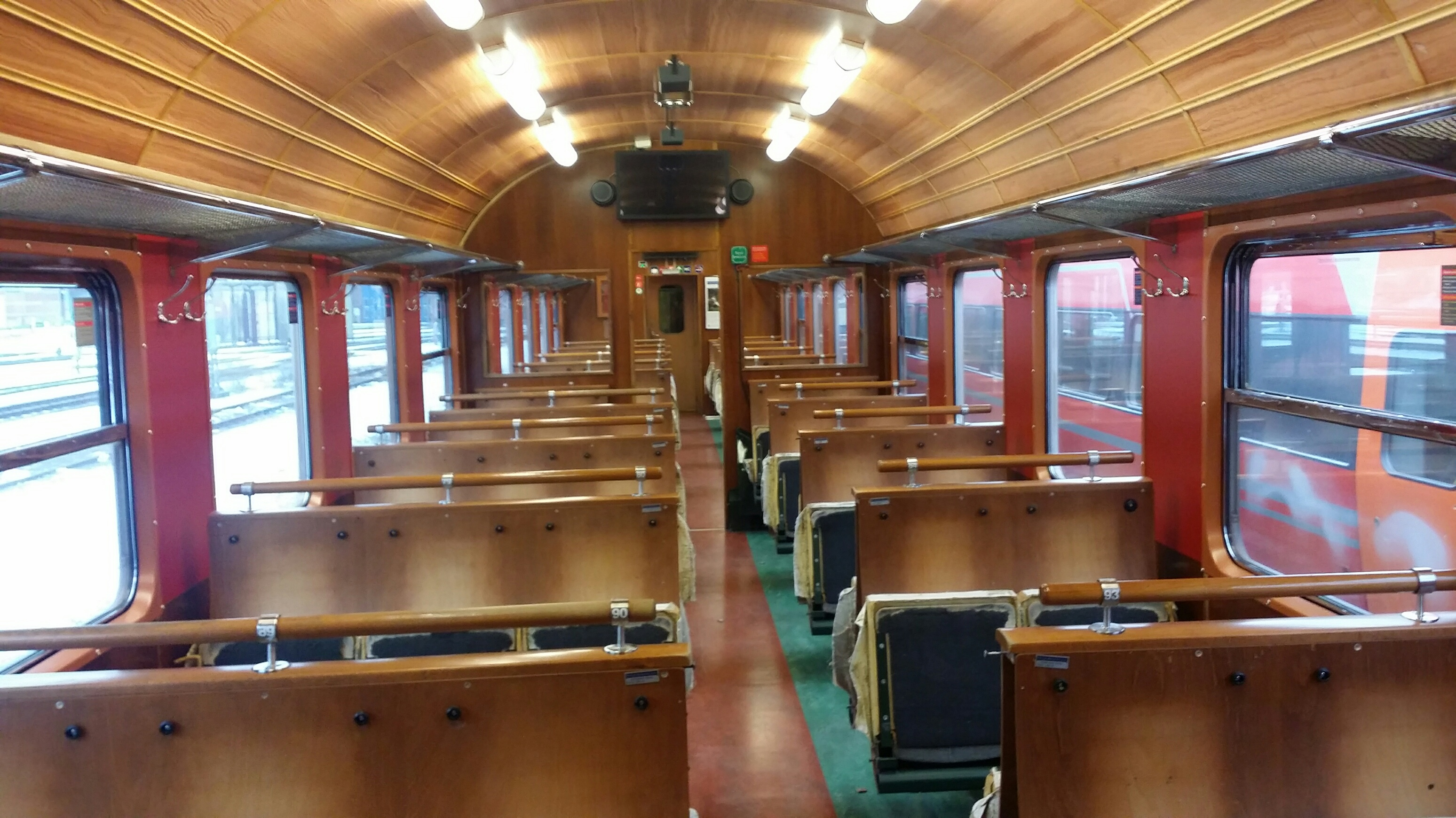 Interiøret i vogn ombygget for Flåmsbanen.